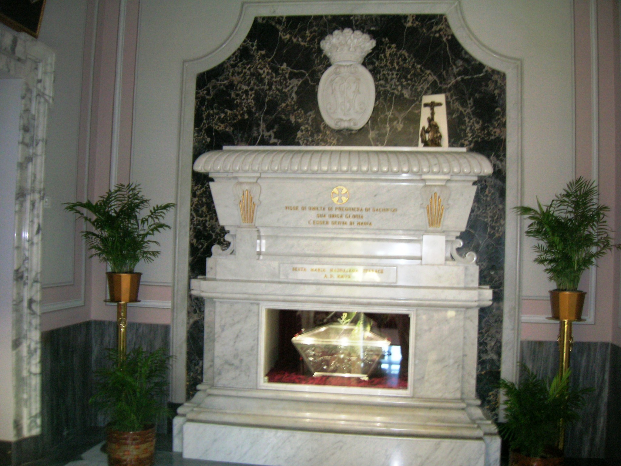 La tomba della beata Maria Maddalena Starace nel Santuario del Sacro Cuore a Castellammare di Stabia